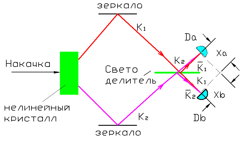 Квантовый светоделитель